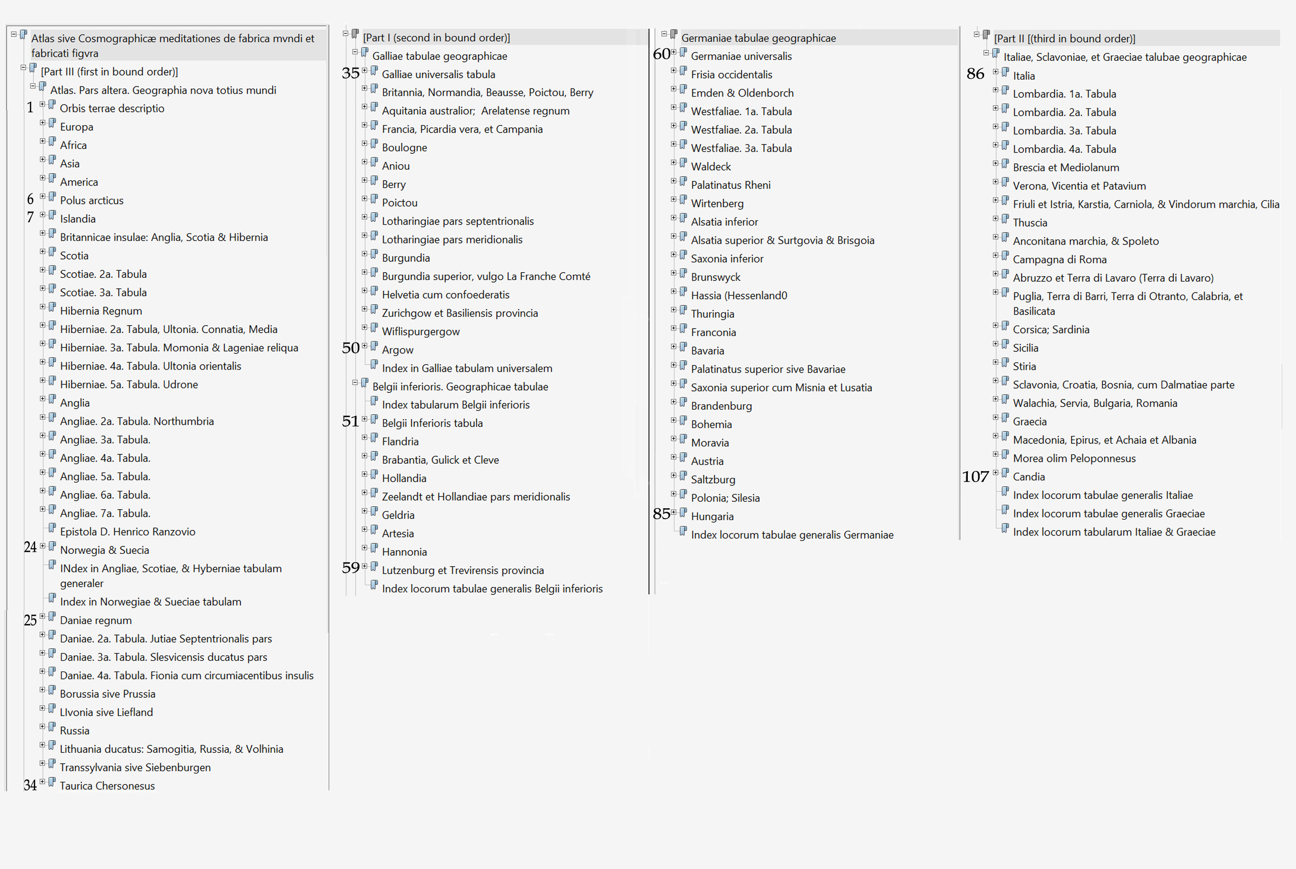 Gemonteerde screenshots van de bladwijzer